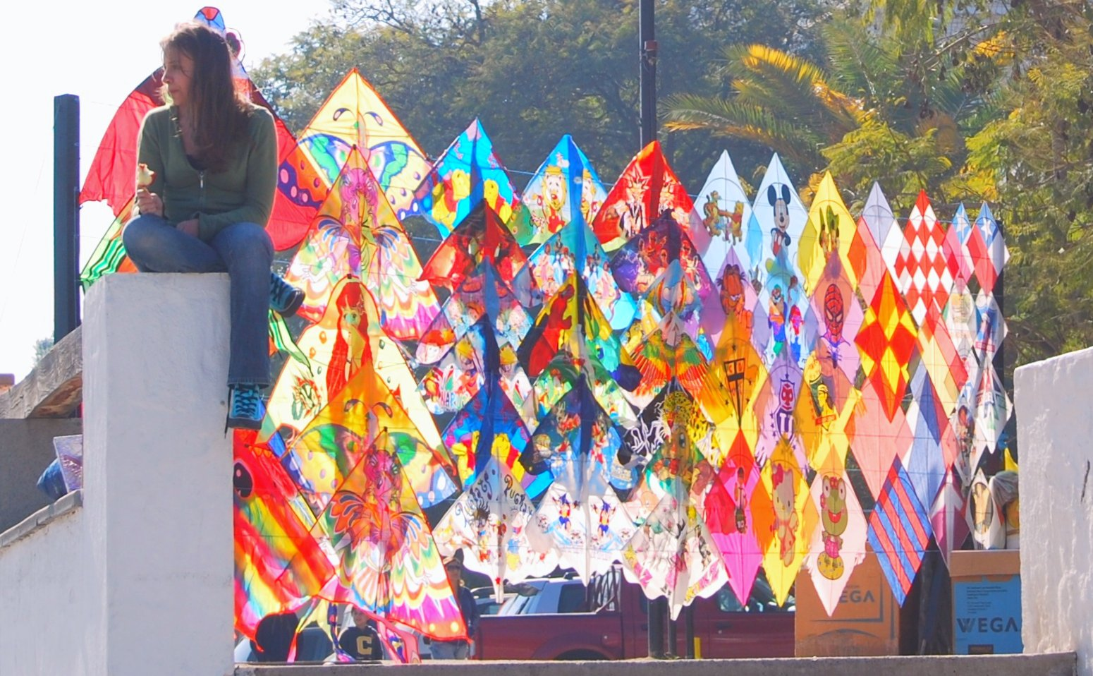 Volantines en los Dominicos